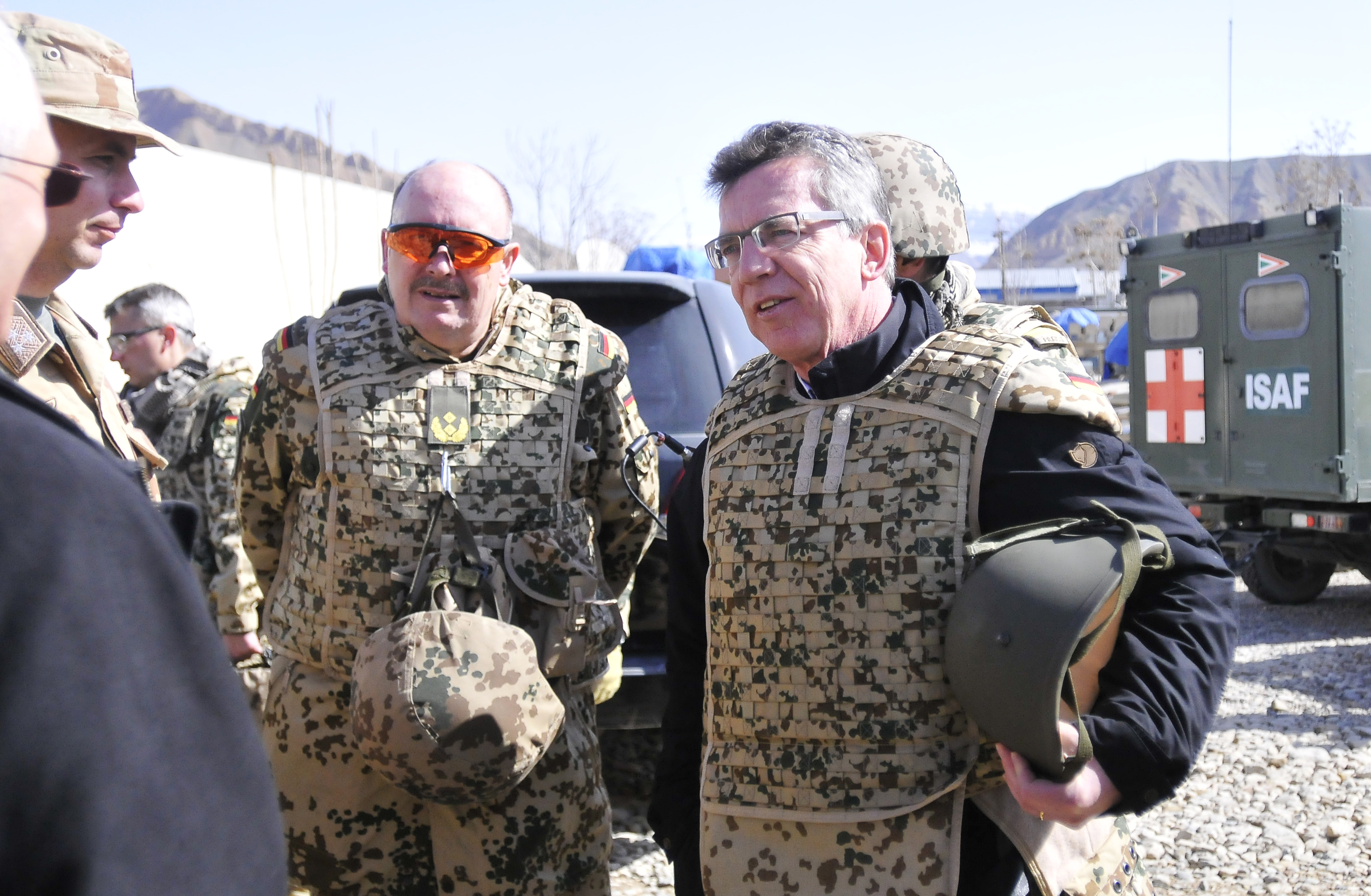 Verteidigungsminister Thomas de Maizière traf am Montag dem 5. März 2012 um 3.30 Uhr mitteleuropäische Zeit (7 Uhr Ortszeit) zu einem seit längerem geplanten Überraschungsbesuch in Termez ein. Unter anderem stehen auf seinem Programm Gespräche mit den ungarischen Partnern des regionalen Wiederaufbauteam (PRT[Provincial Reconstraction Team]) in Pol-i-Khomri. Schwerpunkt der Reise ist der Besuch der deutschen Operationsbasis, dem OP-North (Observation Post North) im Baghlan-Tal. (Neben de Maizière ist Generalmajor Erich Pfeffer abgebildet.) Quelle: Bundeswehr.